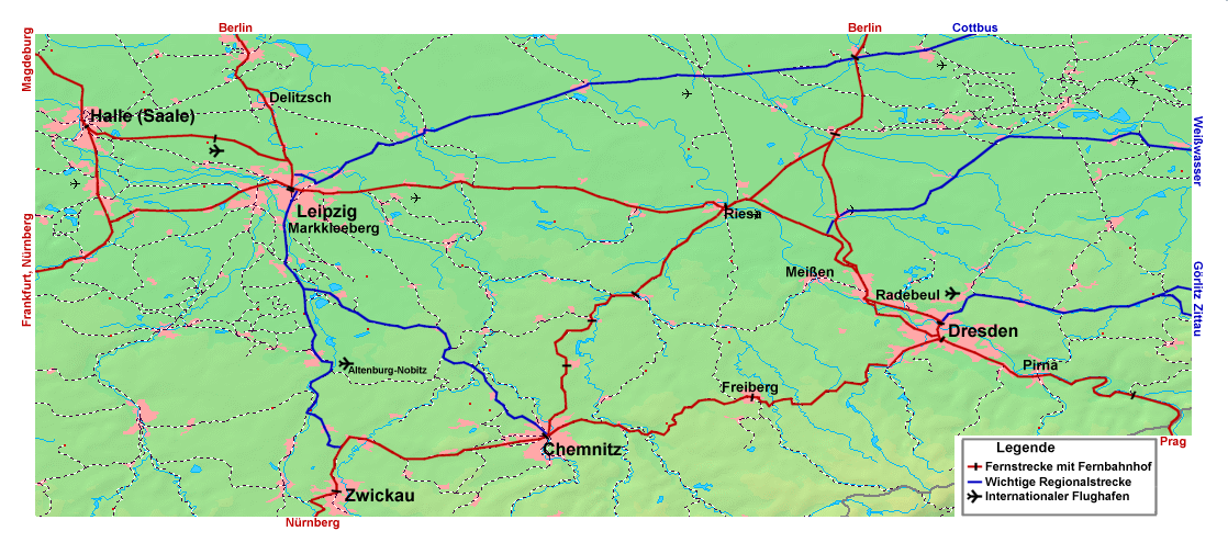 Topografisches Liniennetz des Sächsischen Dreiecks